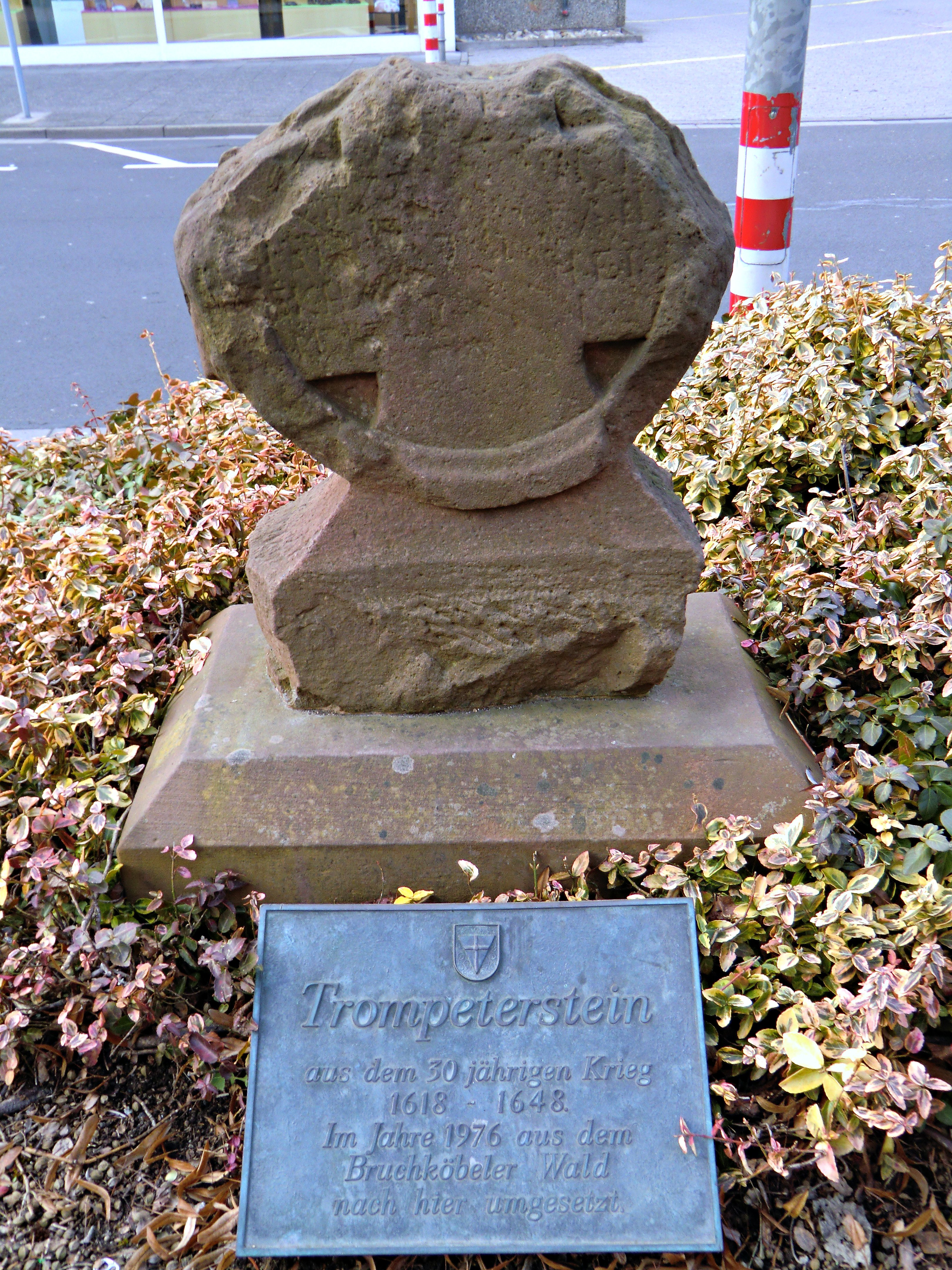 Der Trompeterstein in der Straße Am Inneren Ring, bei Haus Nr. 25a in 63486 BruchköbelThis is a photograph of an architectural monument.